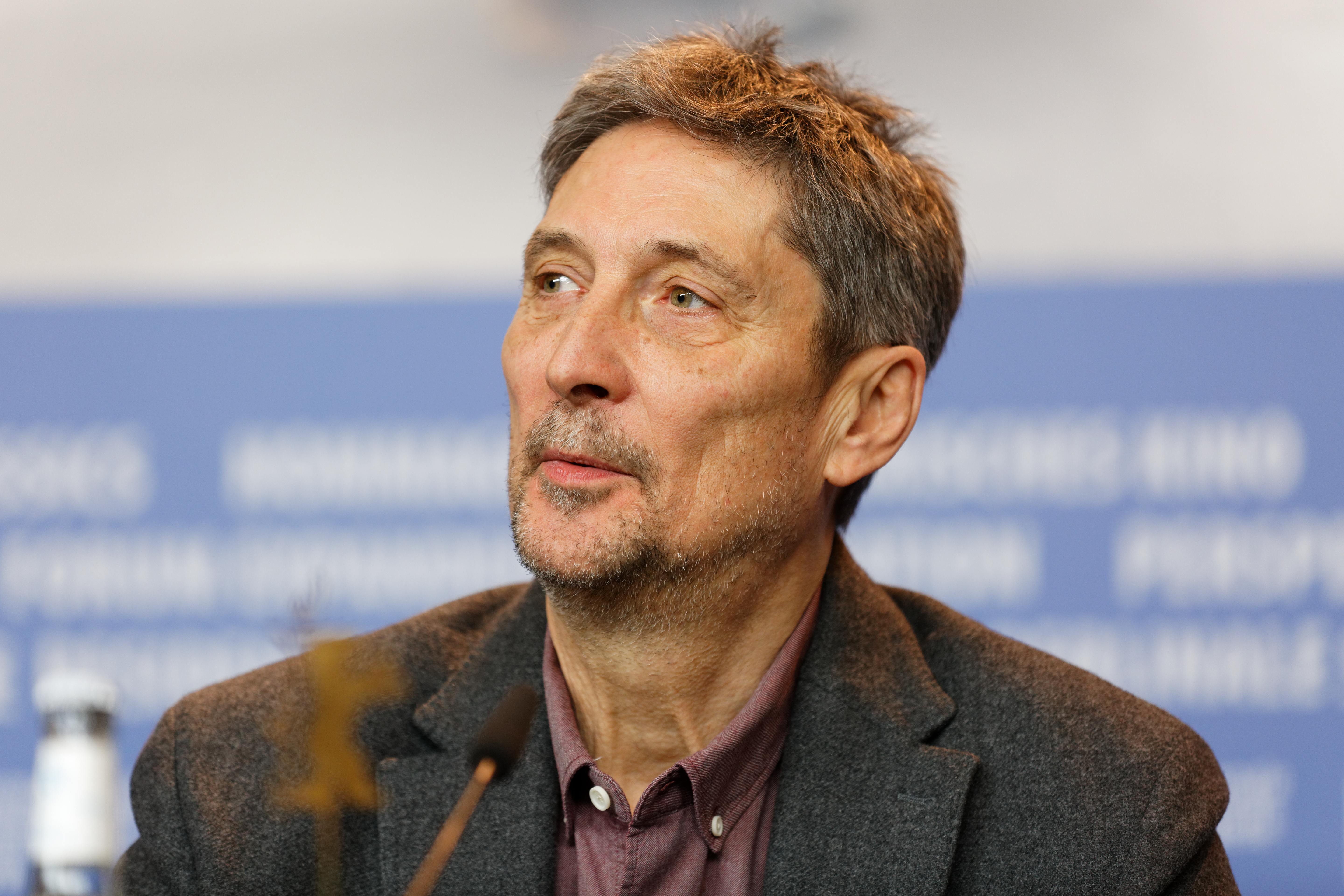 Géza Morcsányi bei der Pressekonferenz zu Testről és lélekről (On Body and Soul) zur Berlinale 2017